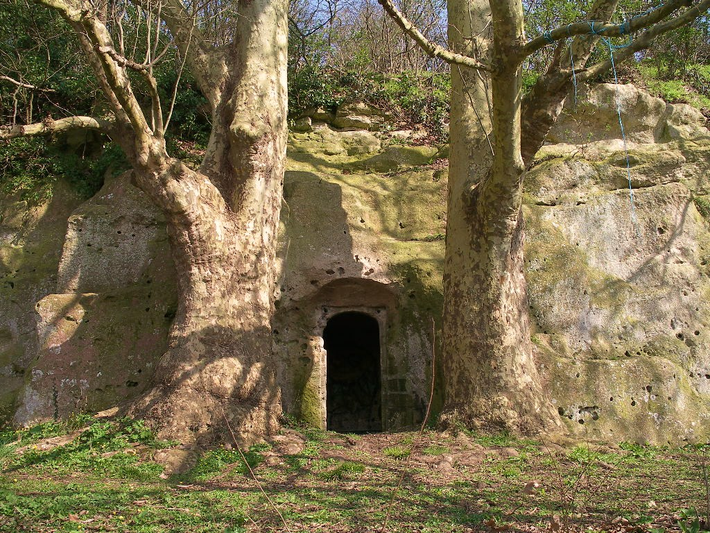 Chambre troglodyte au camp romain de la Burette à Banville (Calvados)